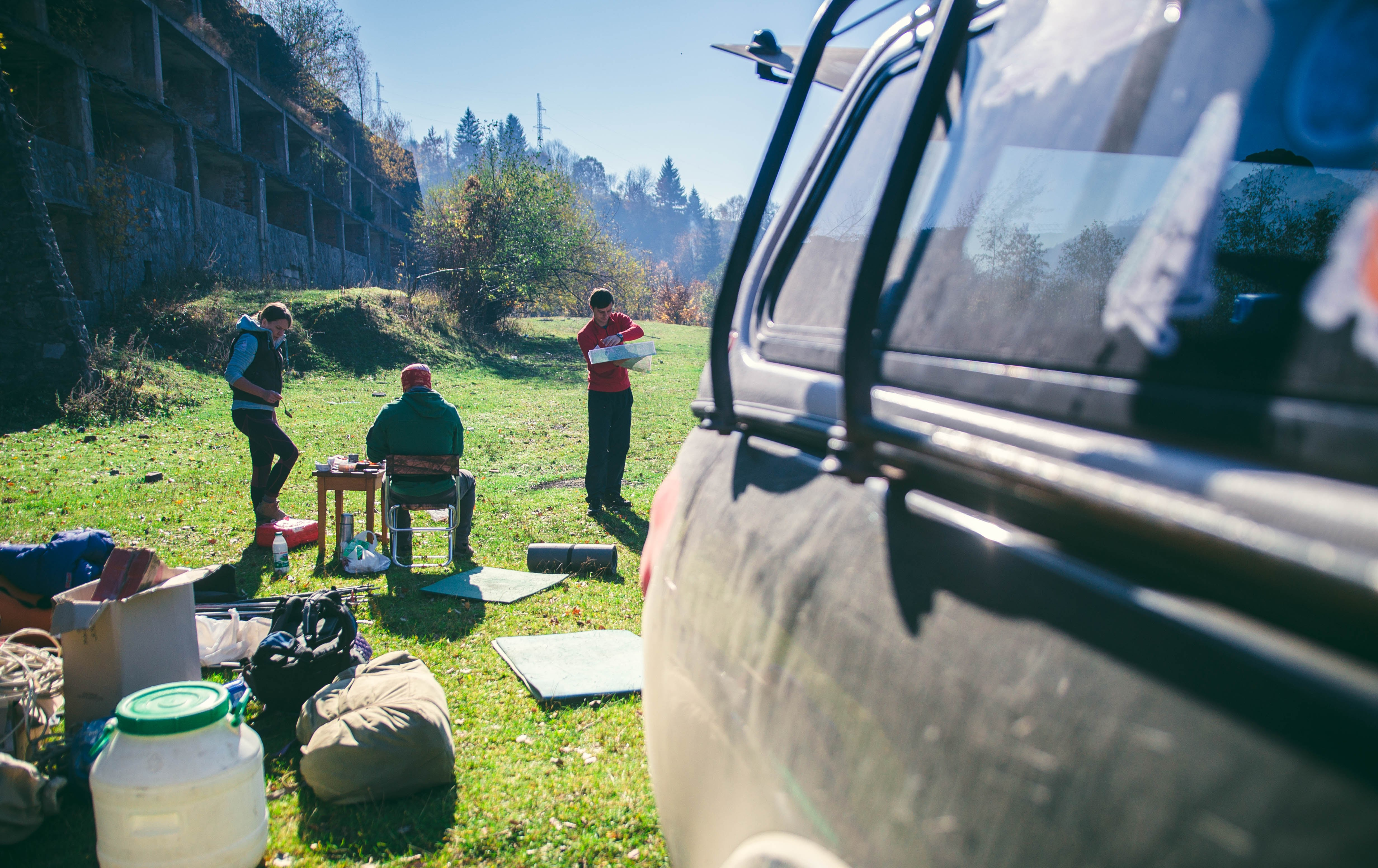 Приготування до Нічного чорногірського марафону у с. Кваси (місце старту). Жовтень 2017